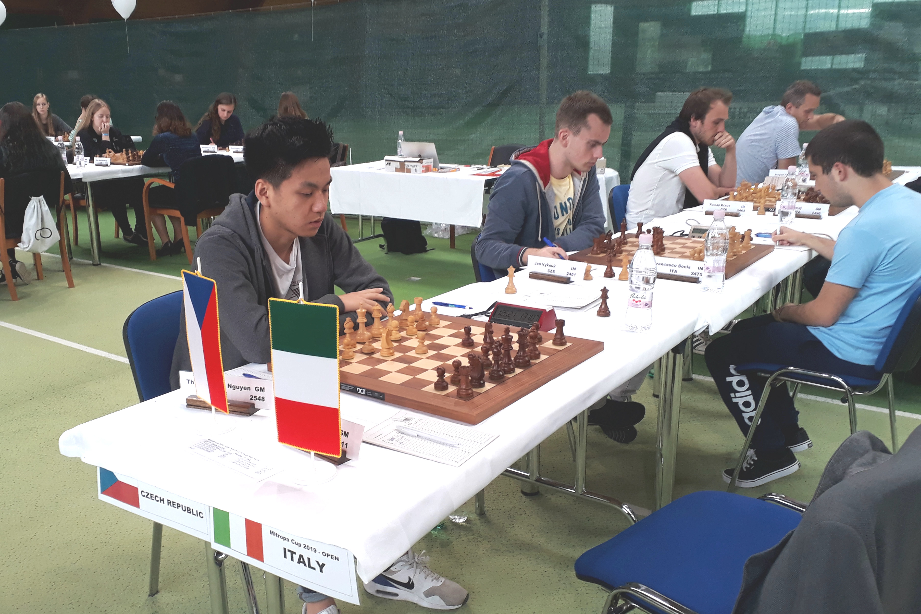 Tschechien-Italien: Thai Dai Van Nguyen an Brett 1, Runde 4 Mitropa Cup 2019 in Radenci.